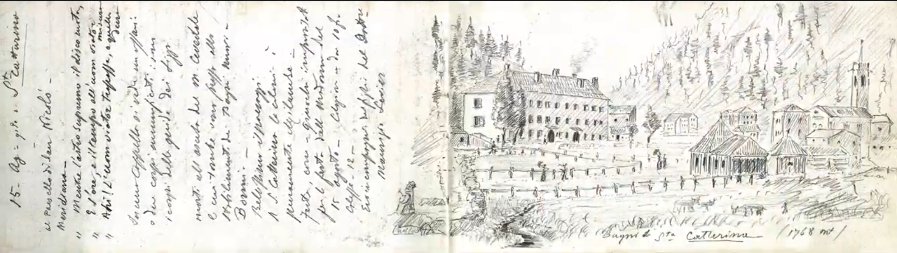 I Bagni di Santa Caterina Valfurva. Disegno di Enrico Alberto d'Albertis tratto dai taccuini di viaggio del Capitano Enrico d'Albertis - Cure termali a Bormio 1894. Opera conservata dal Museo delle Culture del Mondo di Castello D’Albertis di Genova.